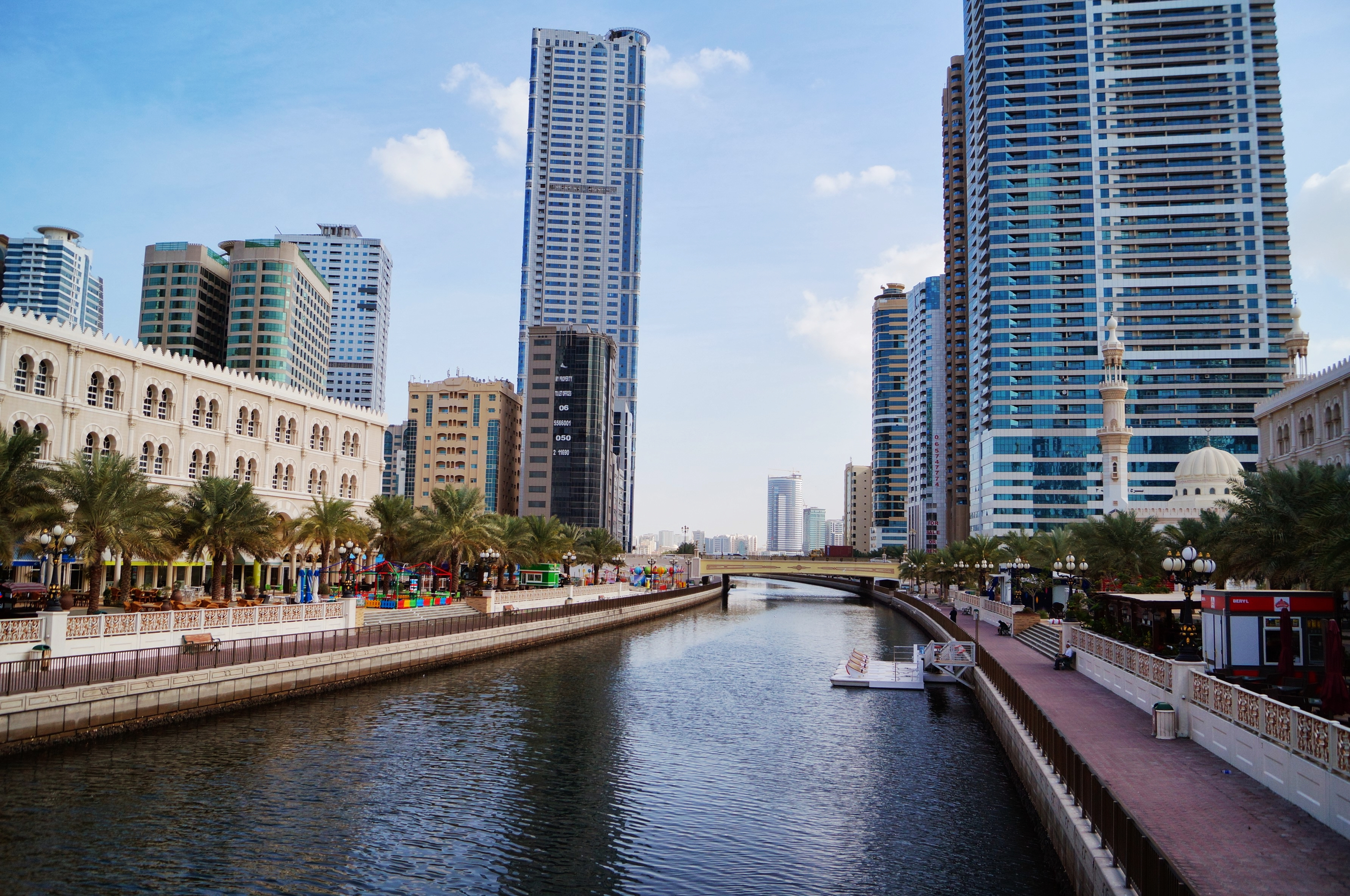 Sharjah - Venice